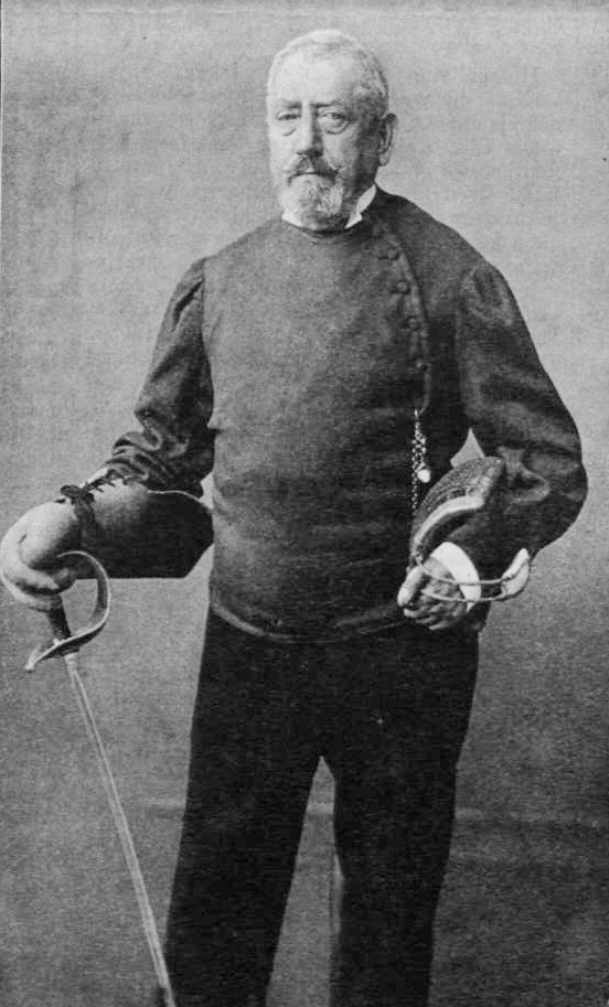 Keresztessy József (1819–1895) vívómester, a magyar kardvívóiskola megalapítója portréja. 1892 körül készült fénykép